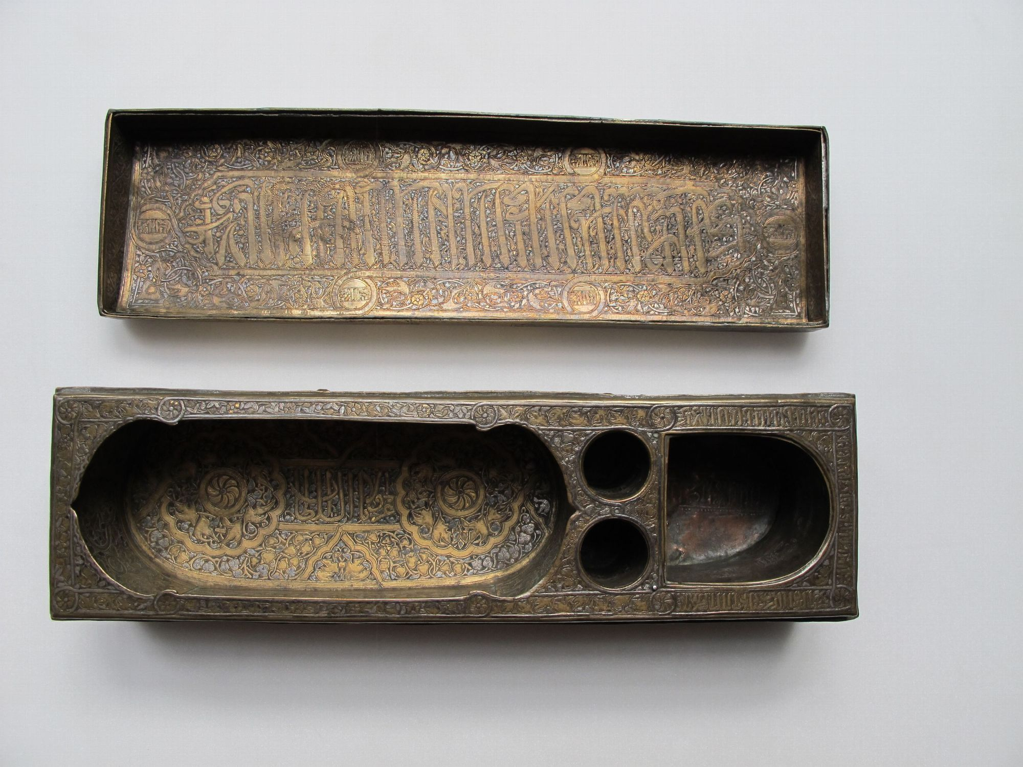 Écritoire du sultan mamelouk baharite Sha'bân Ier. L'écritoire, en cuivre incrusté d’argent, d’or et de pâte noire, composé de plaques de métal martelées et soudées, est entièrement décorée à l'intérieur comme à l'extérieur de bandeaux aux motifs végétaux ou animaliers. Elle servait à ranger calames, encrier et autres outils du copiste. L'inscription à l'intérieur du couvercle en attribue la possession au sultan Sha'bân Ier qui régna entre 1345 et 1346.